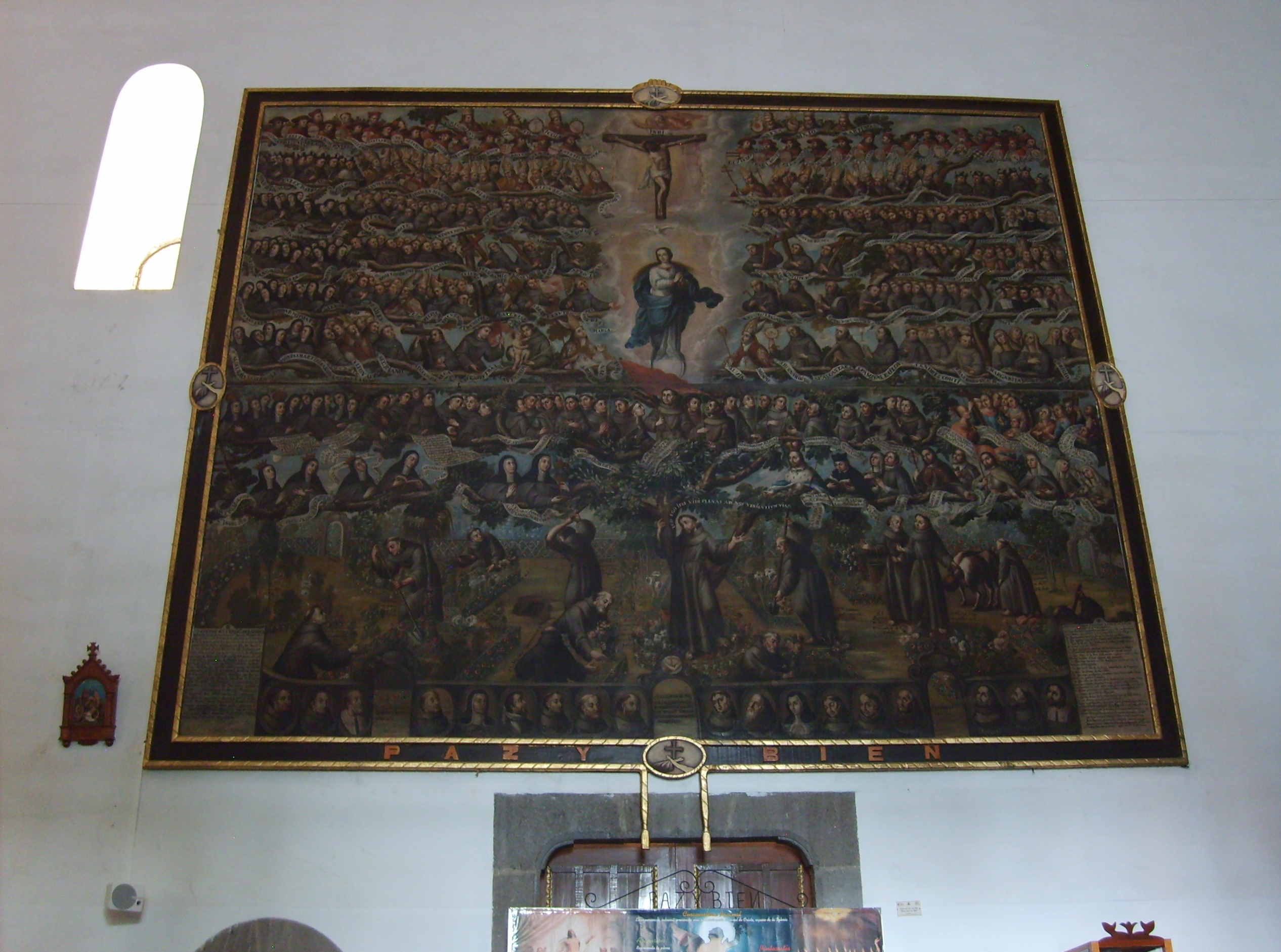 Arbol genealógico de la familia franciscana en el templo conventual de San Francisco (Puebla)